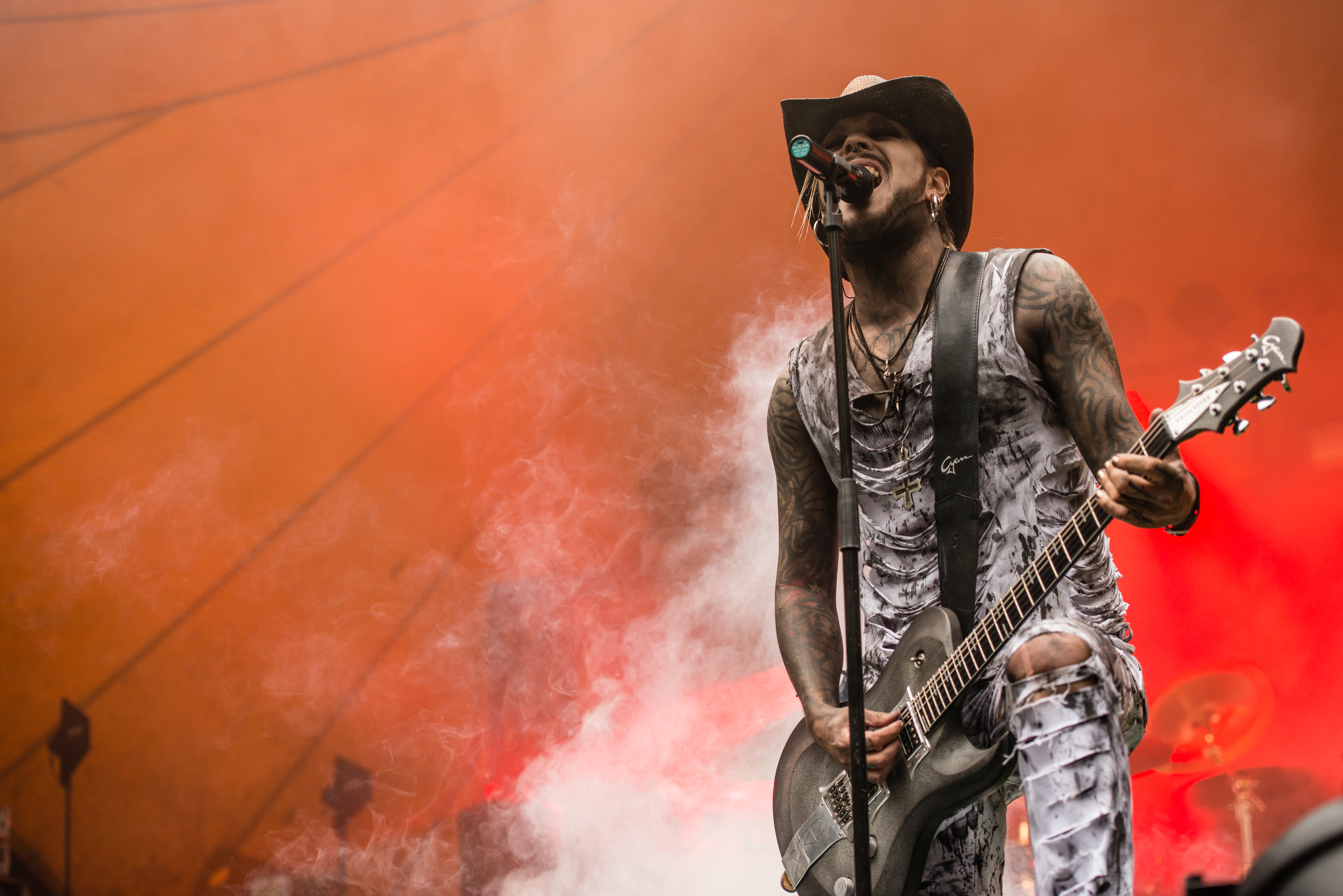 'Feuertal 2014 - Wuppertal': 'Lord of the Lost'